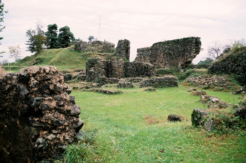 პეტრა. ციხისძირი